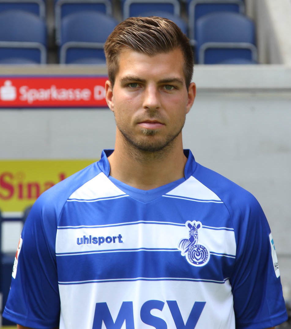 Kevin Wolze 2015